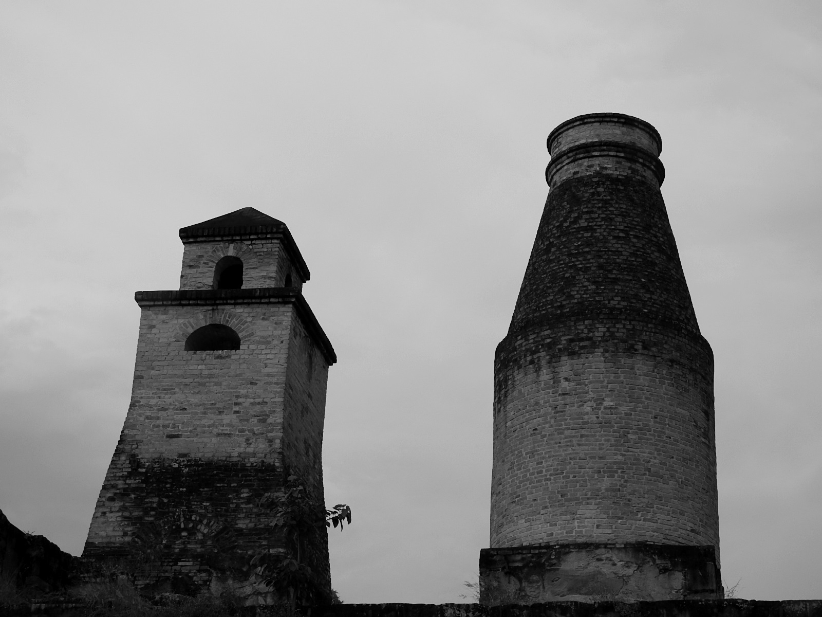 Ruinas dos fornos